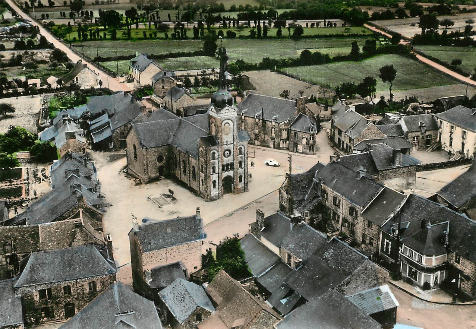 Tresboeuf Archives .